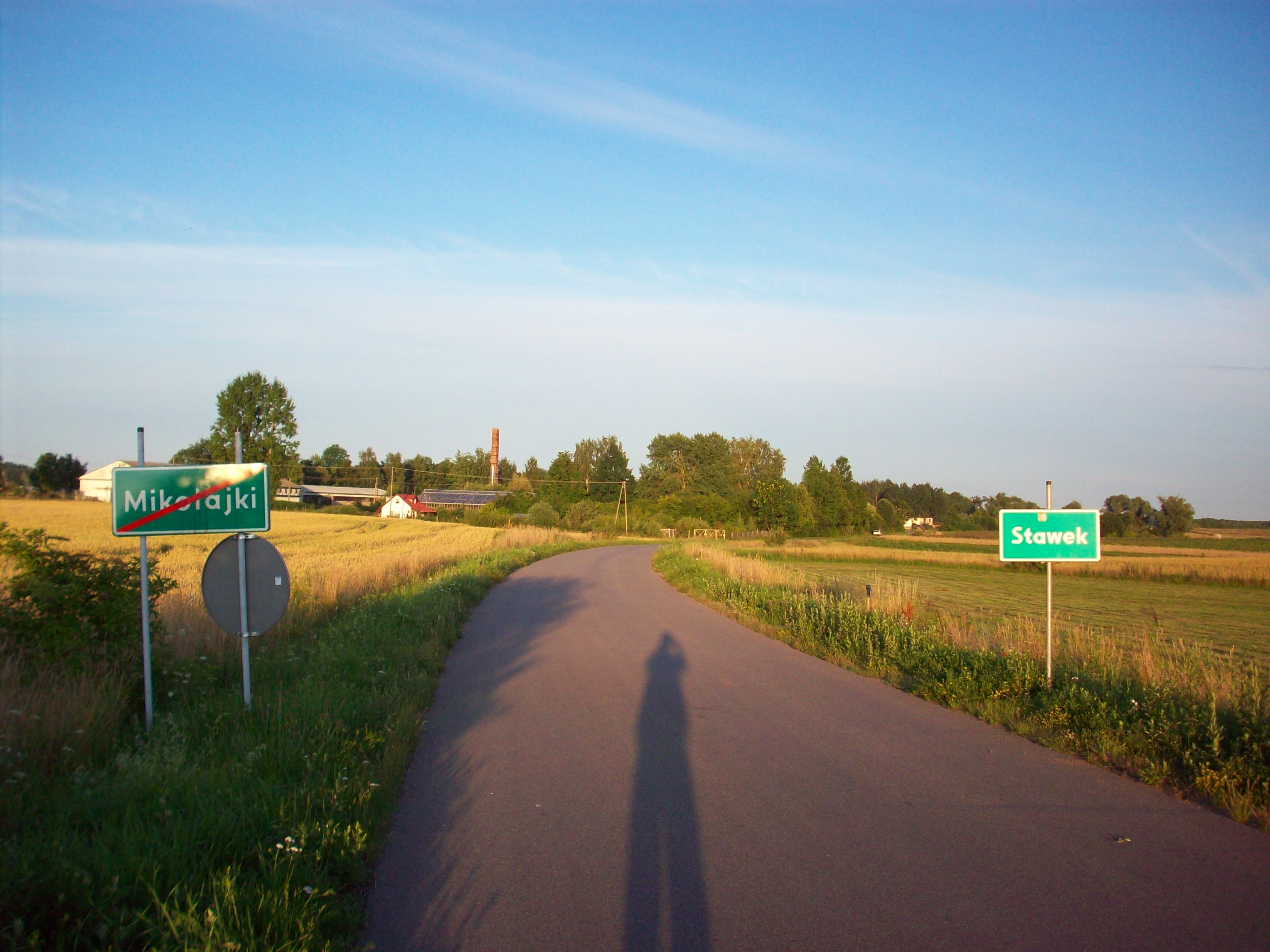 Stawek